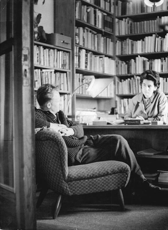 Zentralbild Eckleben 9.5.1963 Zum Tag des Buches - Schriftstellerin Christa Wolf Christa Wolf begann nach ihrem Germanistikstudium als Literaturkritikerin, als Lektorin und Mitarbeiterin im Deutschen Schriftstellerverband. Als erste belletristische Arbeit erschien 1961 die "Moskauer Novelle", die sogleich ungewöhnliche Beachtung fand. Ihre neue Erzählung "Der geteilte Himmel", die im Mai erscheinen wird, steht zur Diskussion für den FDGB-Literaturpreis 1962-1963. Gegenwärtig arbeitet Christa Wolf an einem Filmdrehbuch für ihre Erzählung "Der geteilte Himmel". UBz: Schriftstellerin Christa Wolf und ihr Mann im Arbeitszimmer ihres Heimes